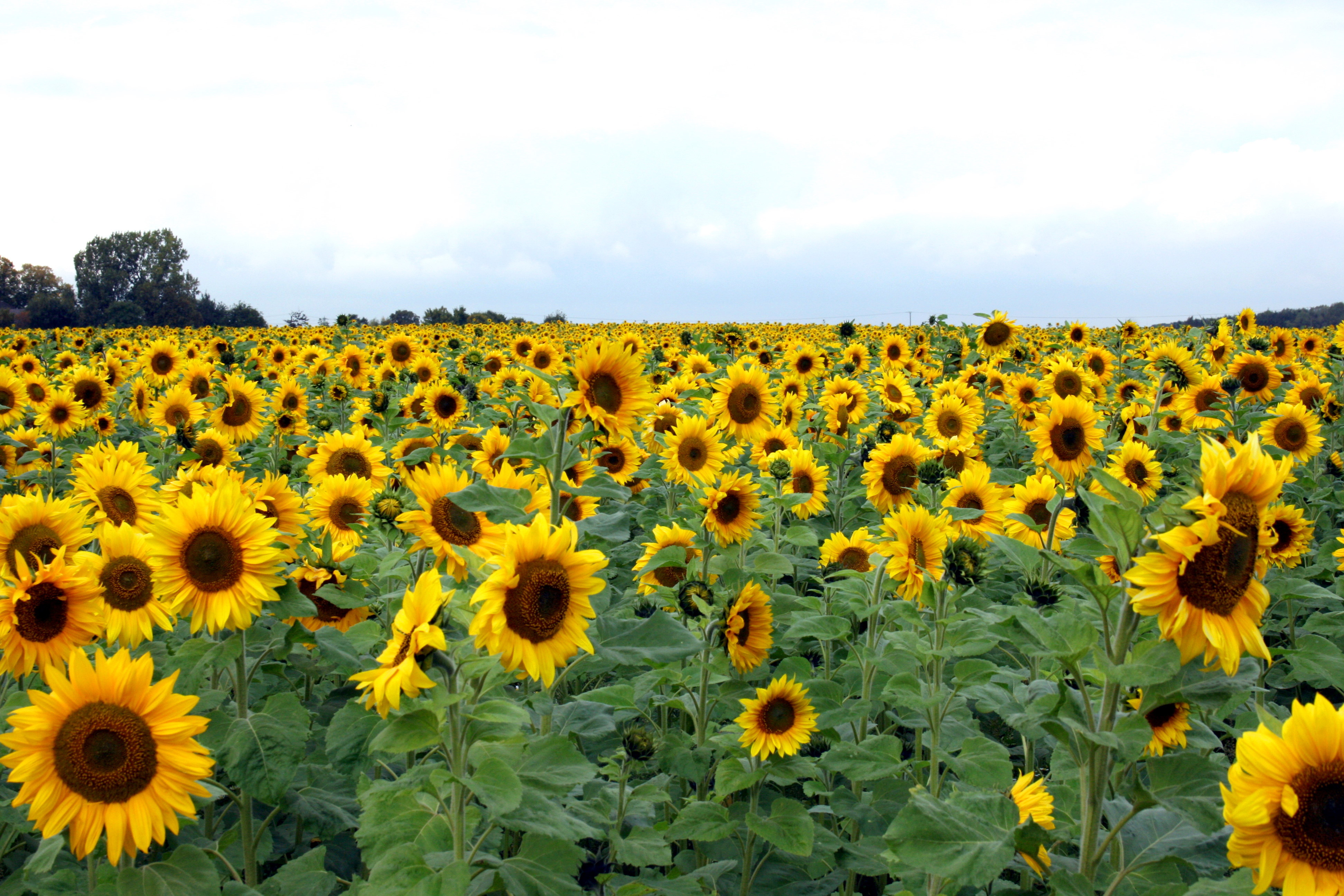 Feld mit Sonnenblumen in Sonsbeck